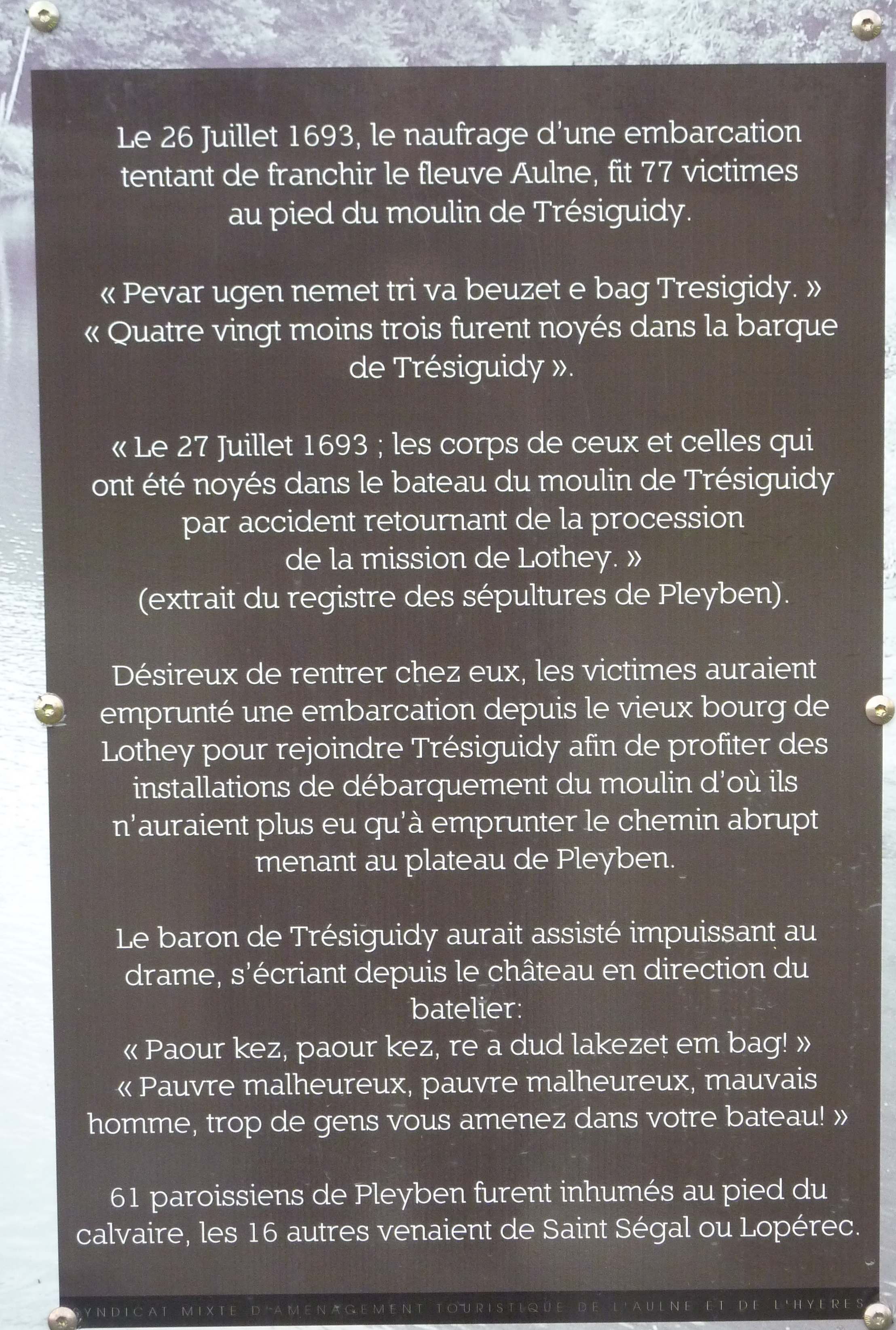 Pleyben : stèle commémorative du drame de Trésiguidy (située sur la rive droite de l'Aulne à un endroit proche du lieu du drame)